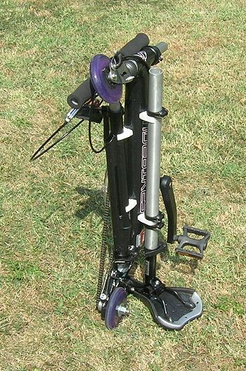 Mini125 2007MY first bike for K Mitsumoto